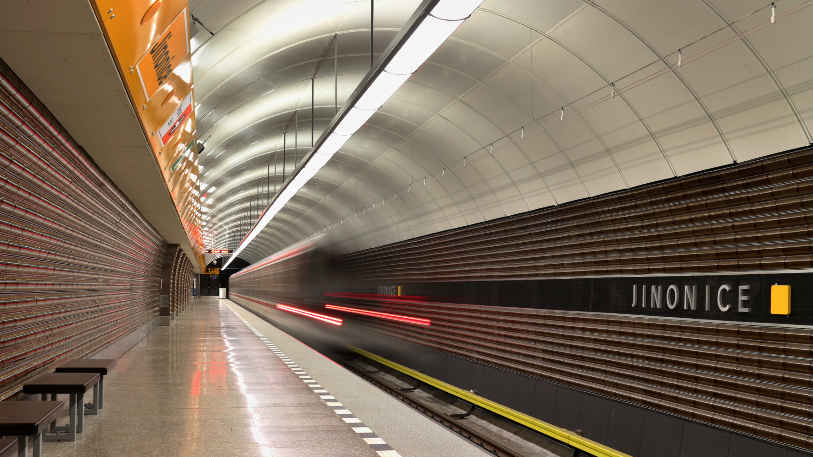 Jinonice metro